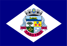 Bandeira da cidade de Cabo Frio